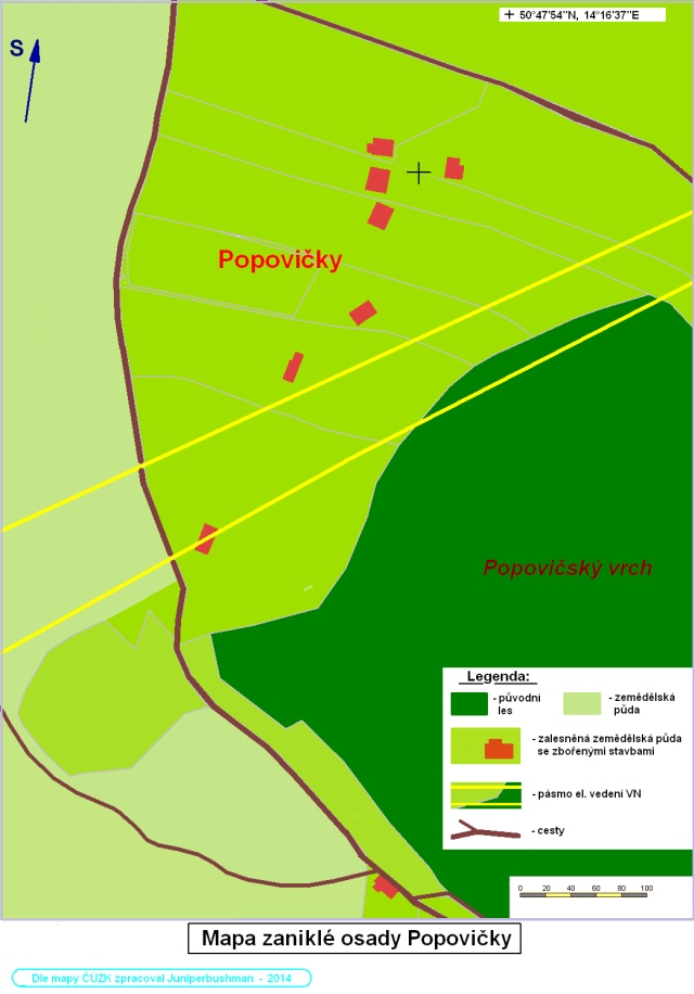 Mapa zaniklé osady Popovičky (Huntířov)